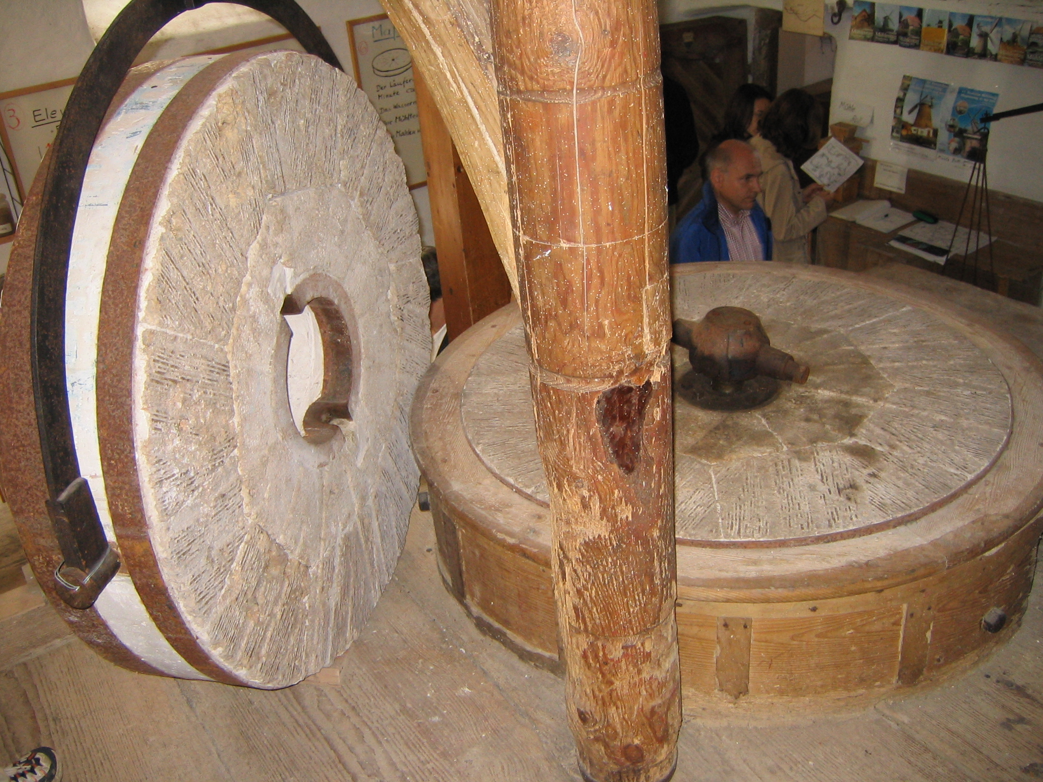 Mühlsteine in der Mühle Boll; Fundort: La Ferté-sous-Jouarre